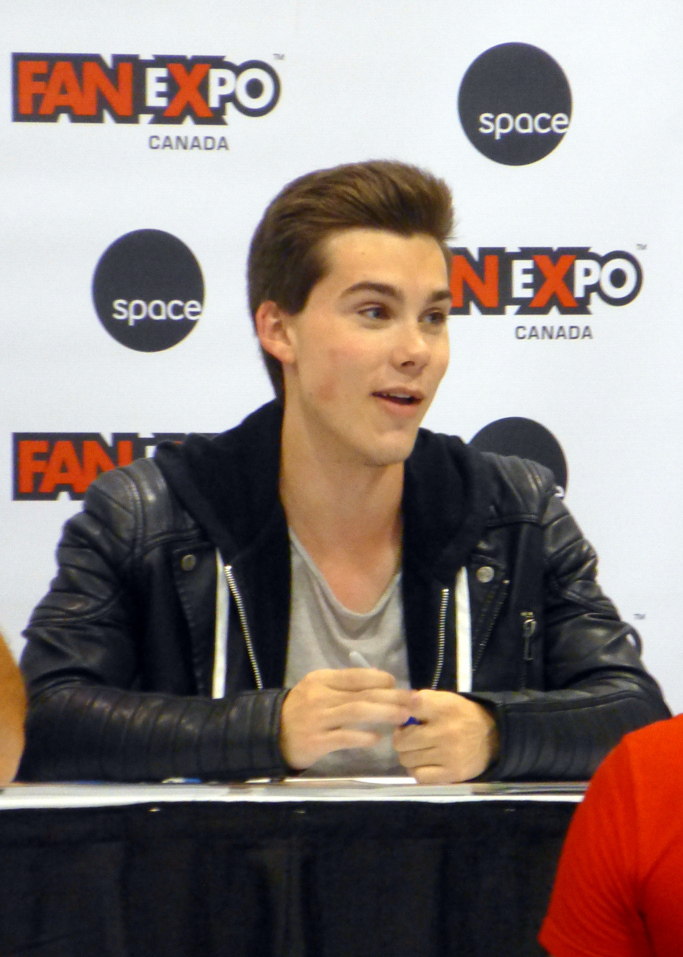 Jeremy Shada